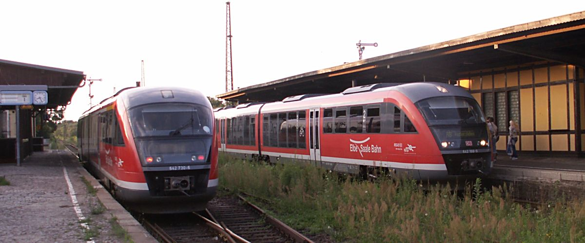 Akener Bahn 2007